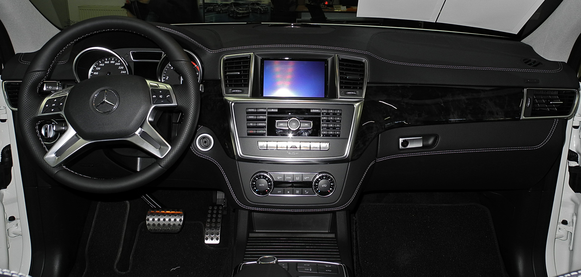 Mercedes-Benz ML 350 BlueTEC 4MATIC (W 166)